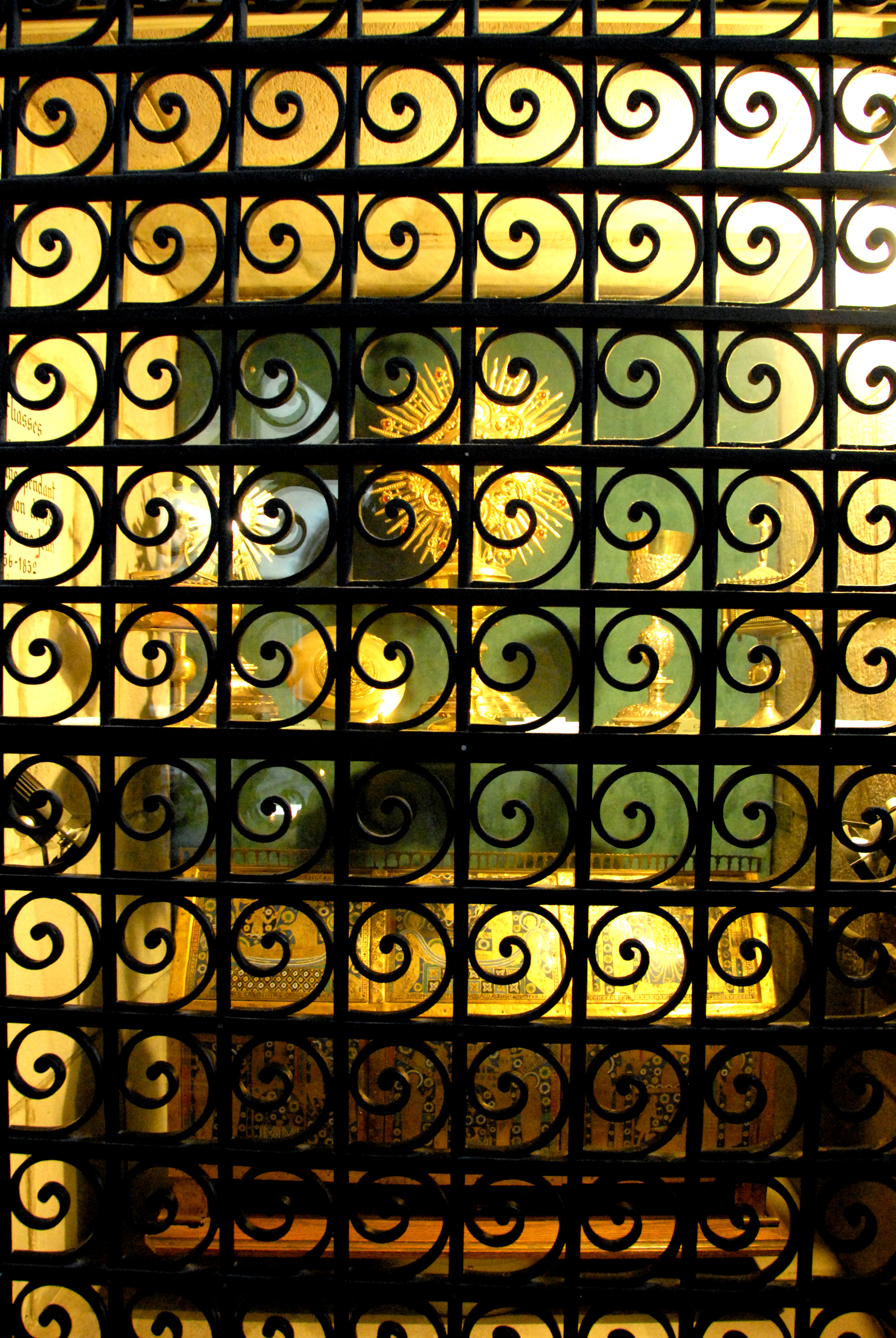 Gitter vor Schrein des Calminius